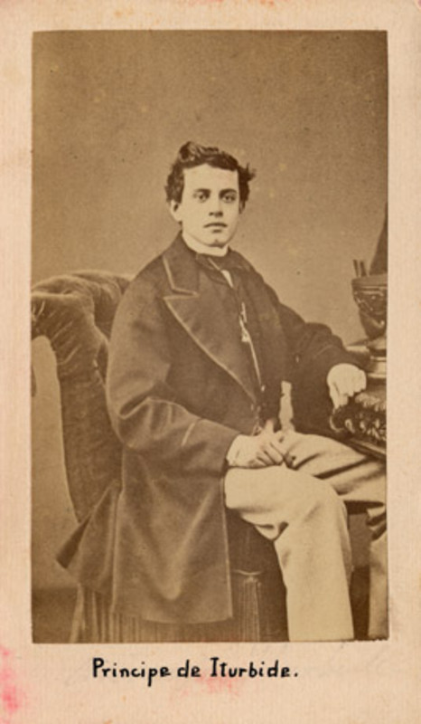 I.O. Anverso: "Principe de Iturbide". Reverso: "Principe Iturbide", "1863-1925", "(Nieto de Agustín de Iturbide)", "Principe don Salvador Iturbide y Marzán".